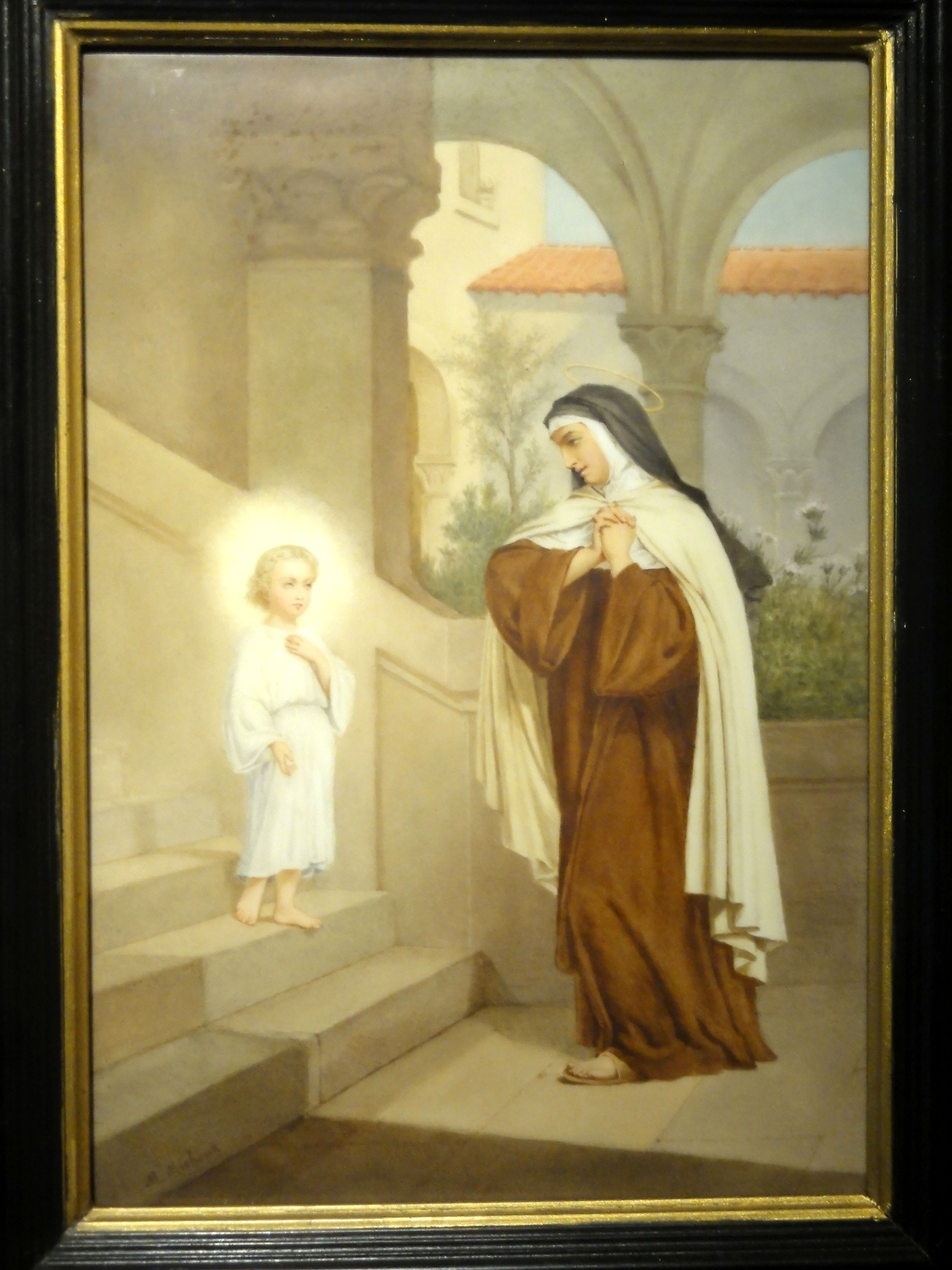 Sainte Thérèse d'Avila ou de l'Incarnation.